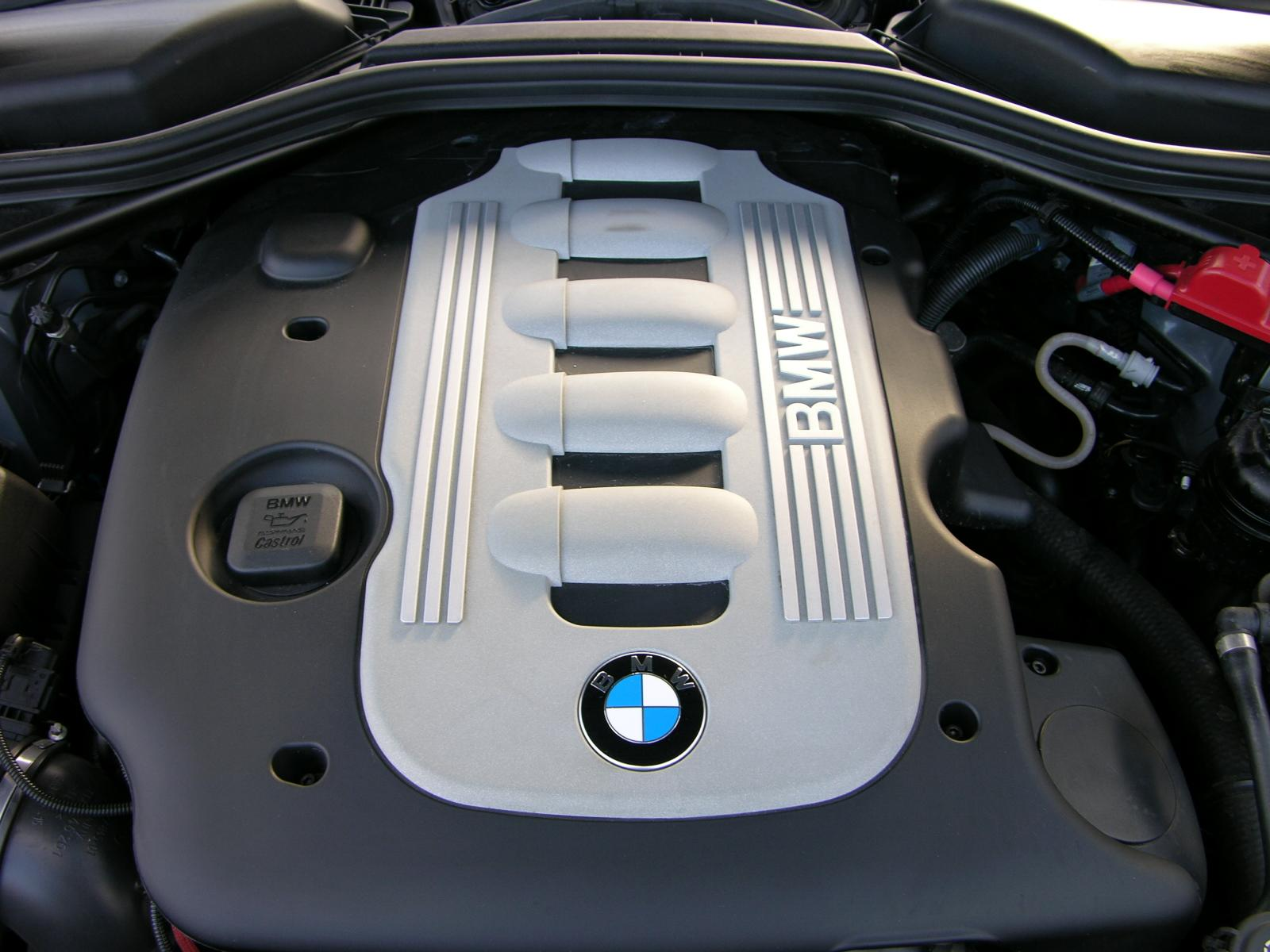 2007 BMW 635d Sport